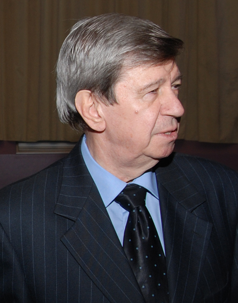 Eduard Kukan